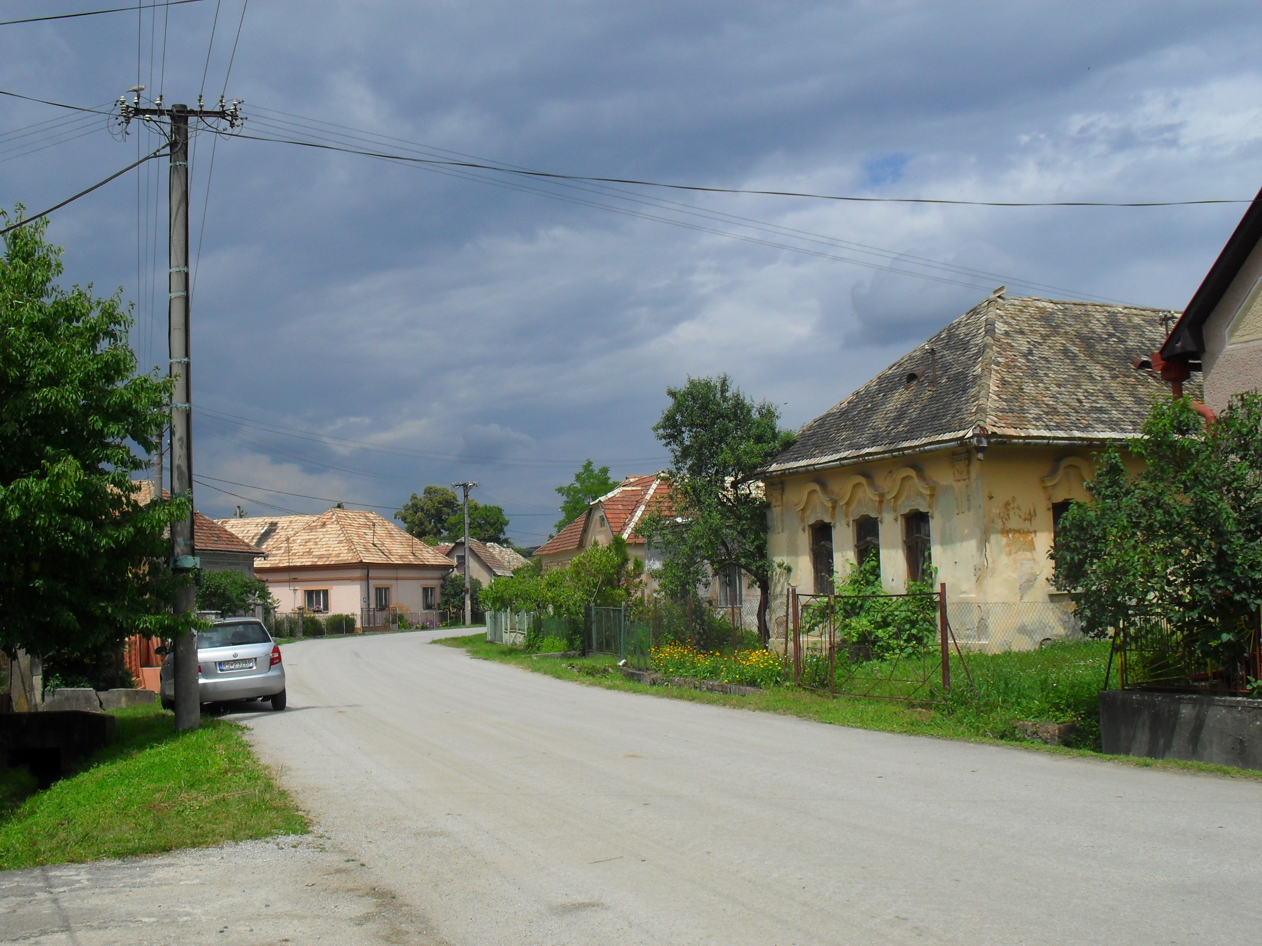 Rakottyás - utcakép